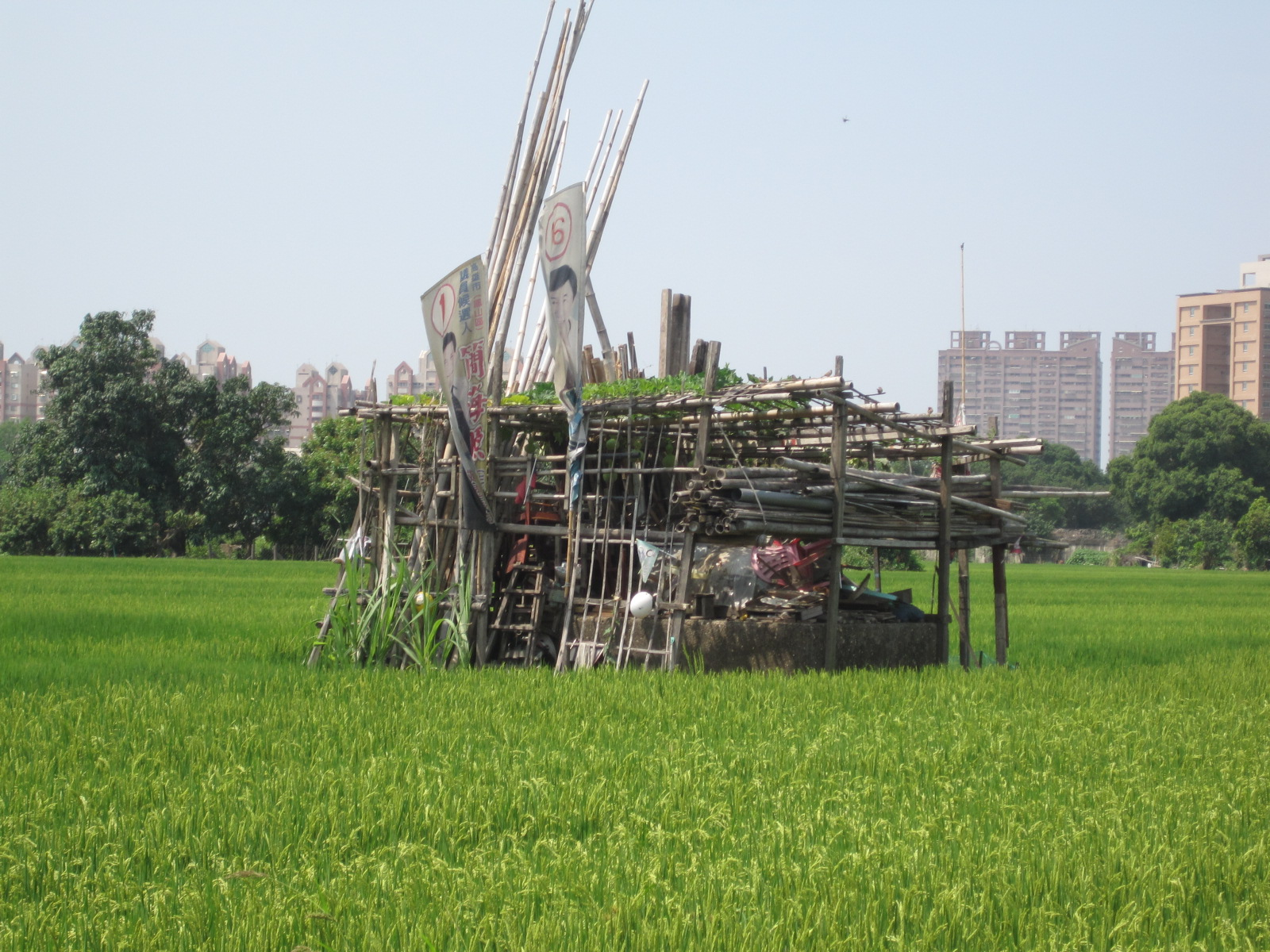 原通訊電塔基座